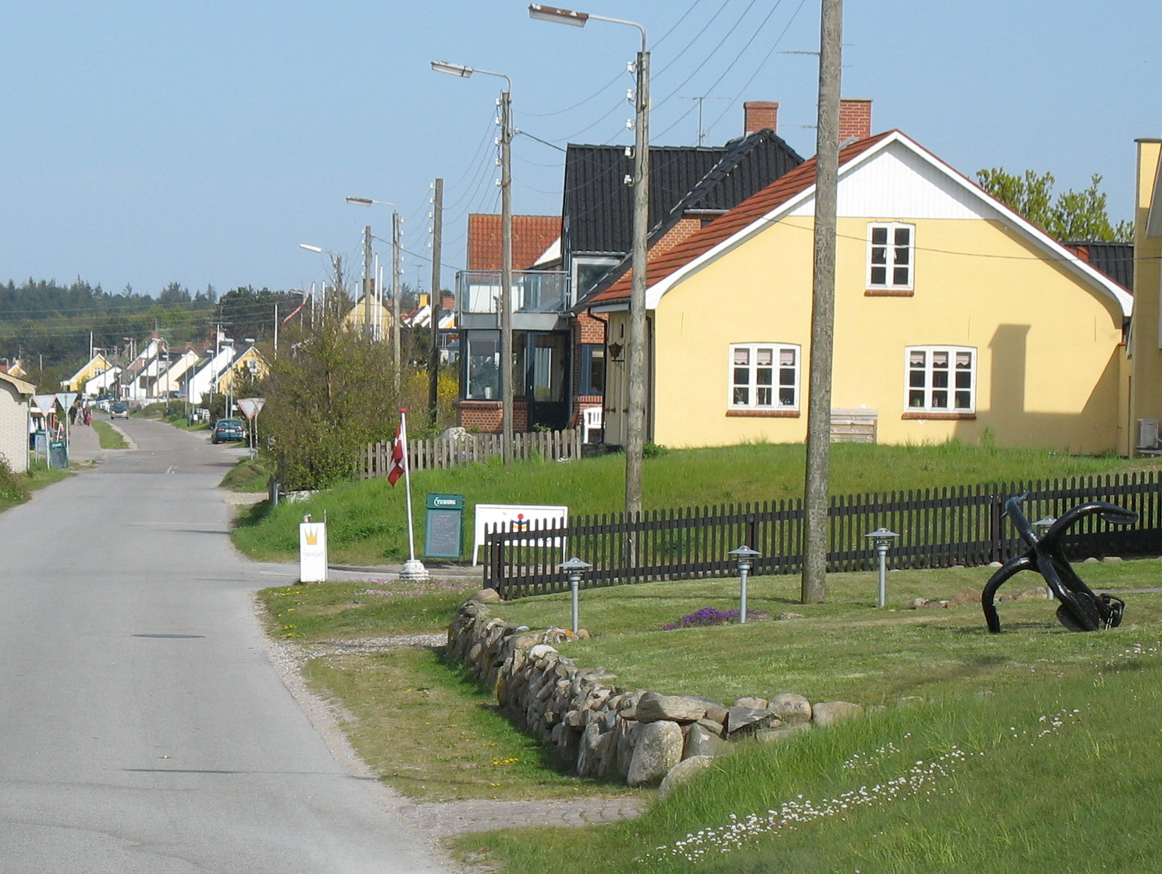 Kystvejen i Bønnerup Strand. Byen er en gammel fiskerlandsby. Havnen i Bønnerup Strand er den eneste egentlige havn på den nordvendte kyst på Djursland.